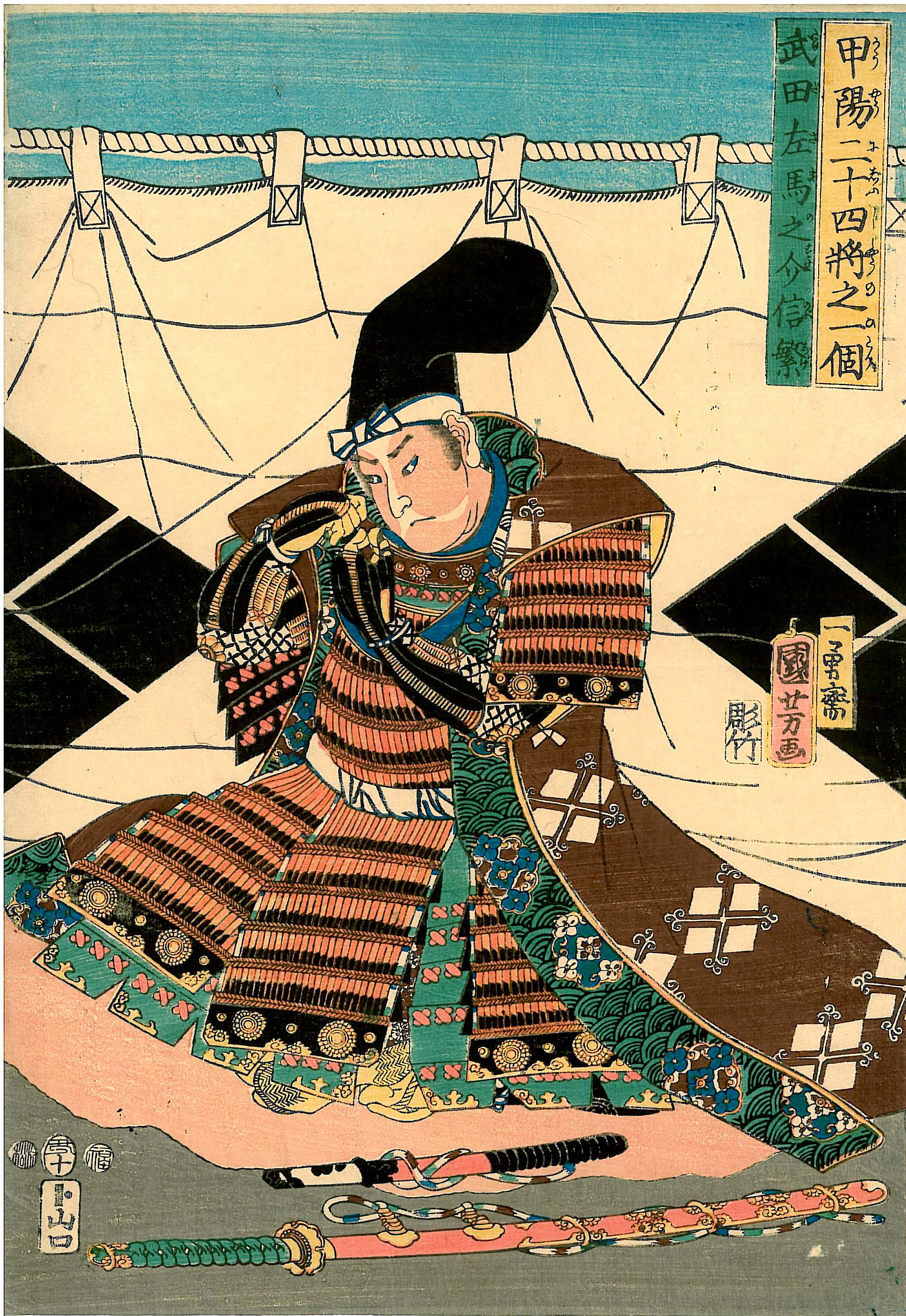 "Takeda Sama-no-suke Nobushige"